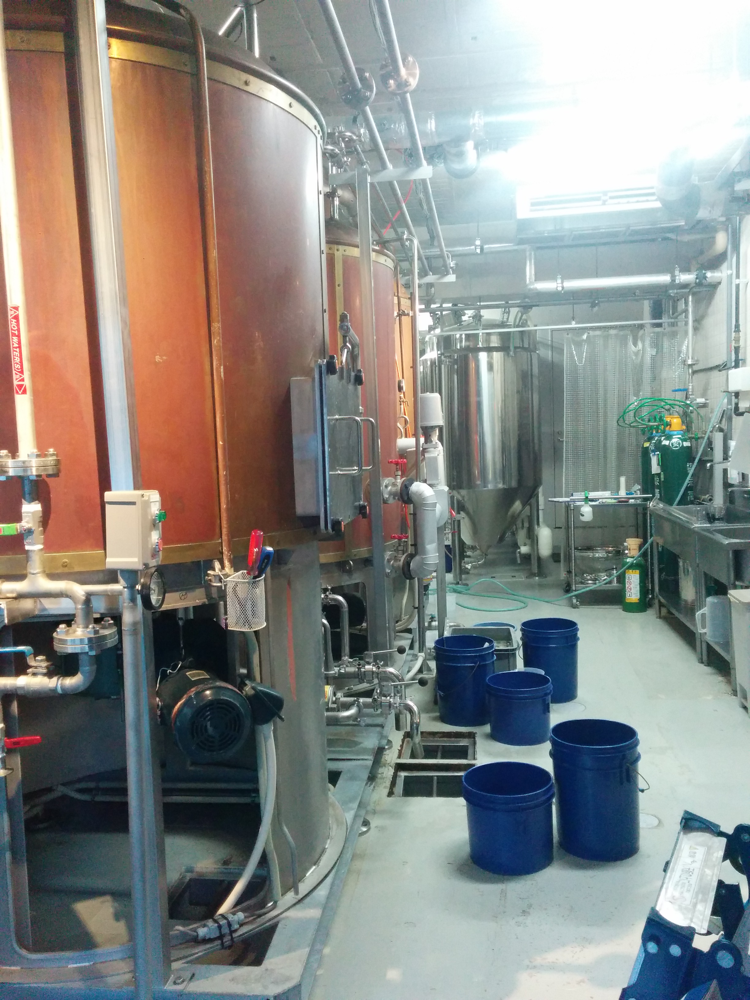 Brewery